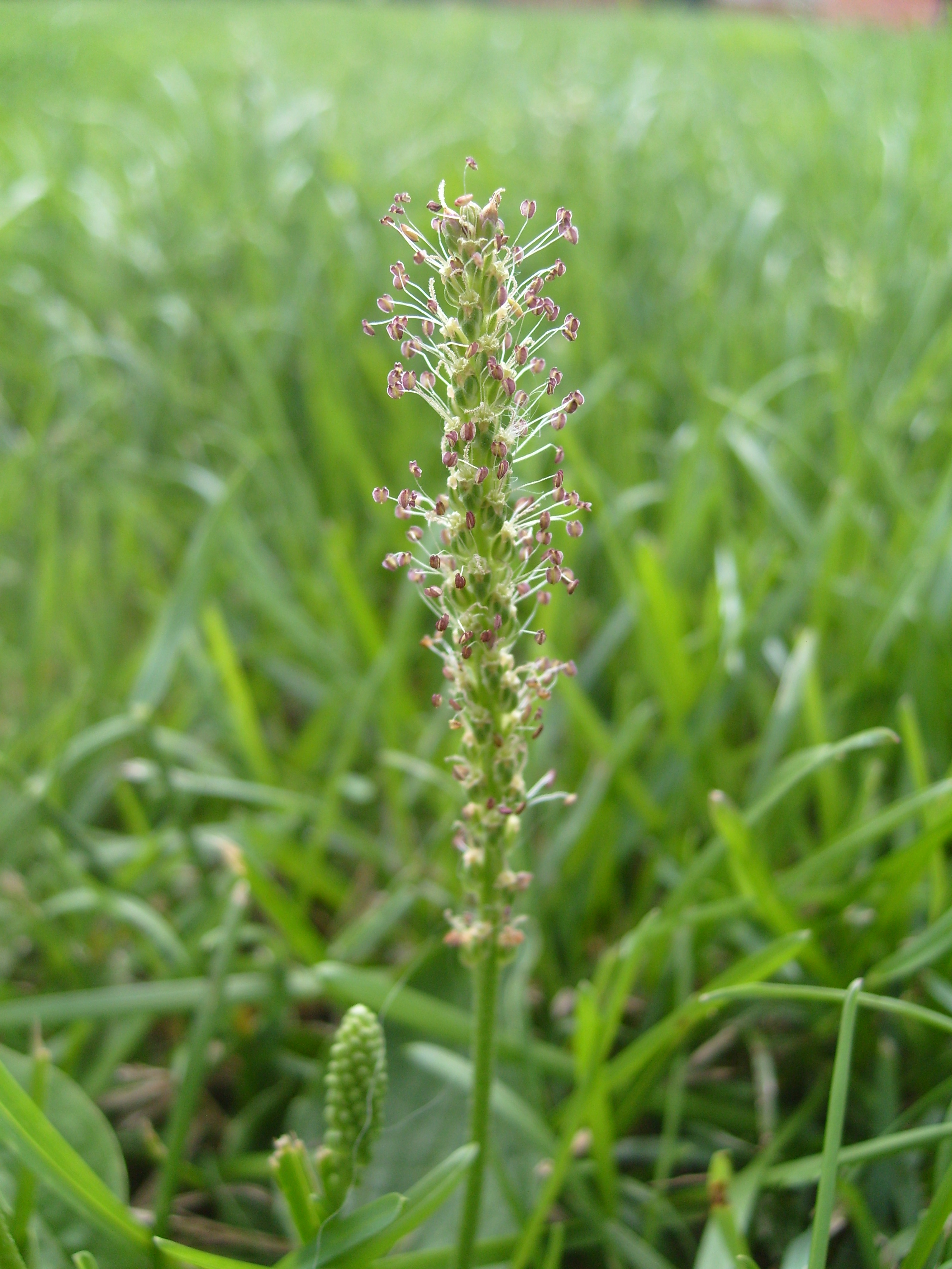 Květenství jitrocelu většího (Plantago major).